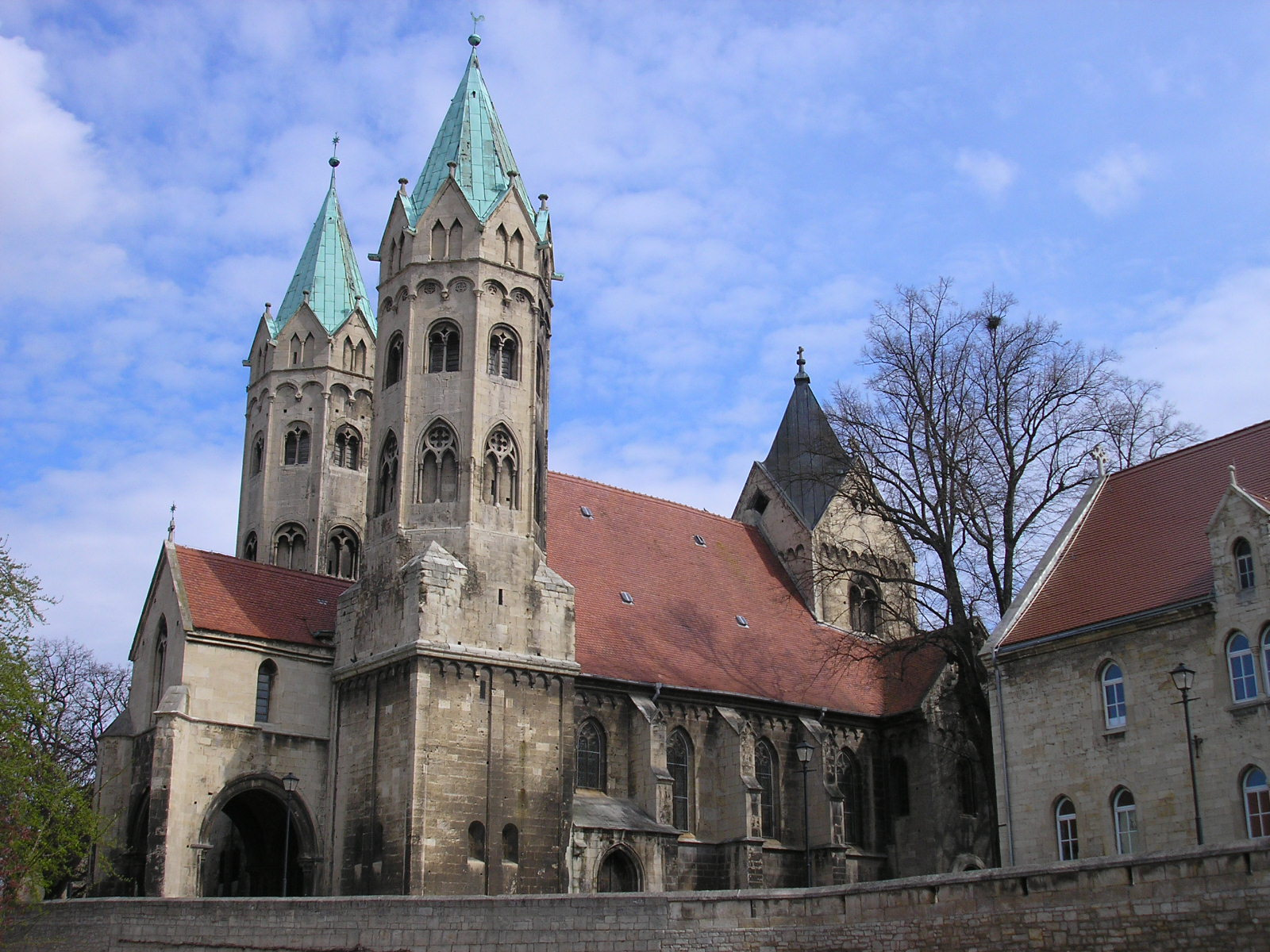 Die Stadtkirche von Freyburg an der Unstrut (Sachsen-Anhalt).